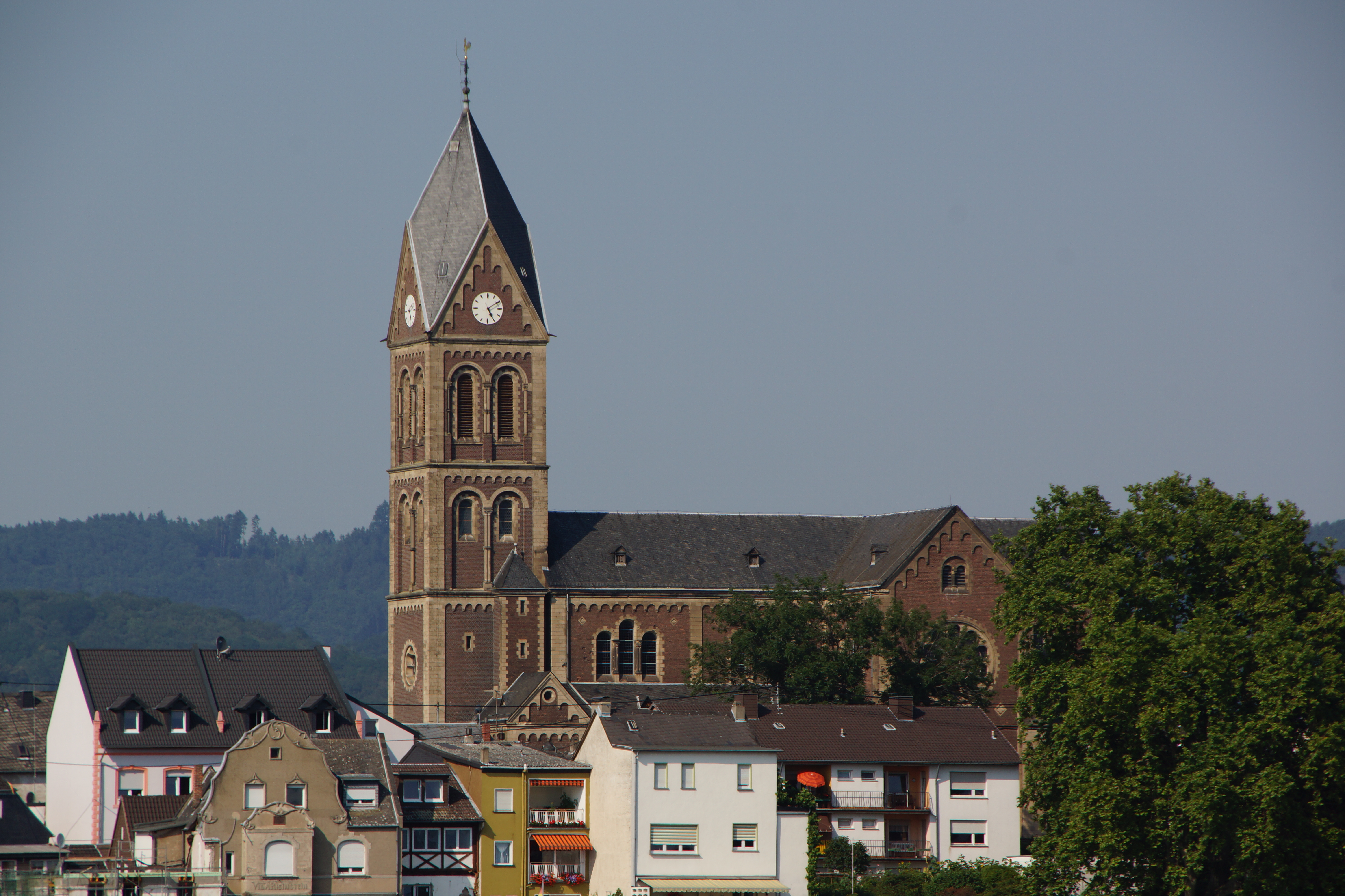 katholische Pfarrkirche St. Martin, Engers, von anderer Rheinseite gesehen